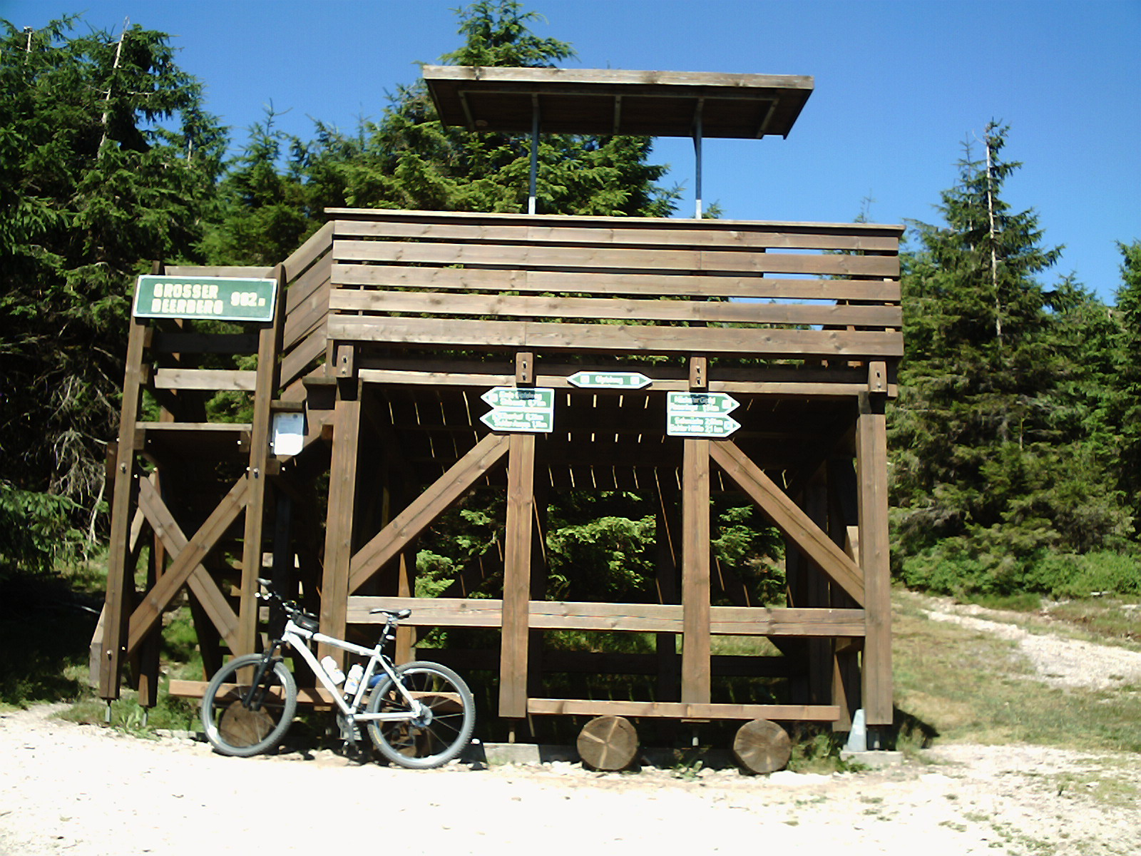 Plänkners Aussicht am großen Beerberg